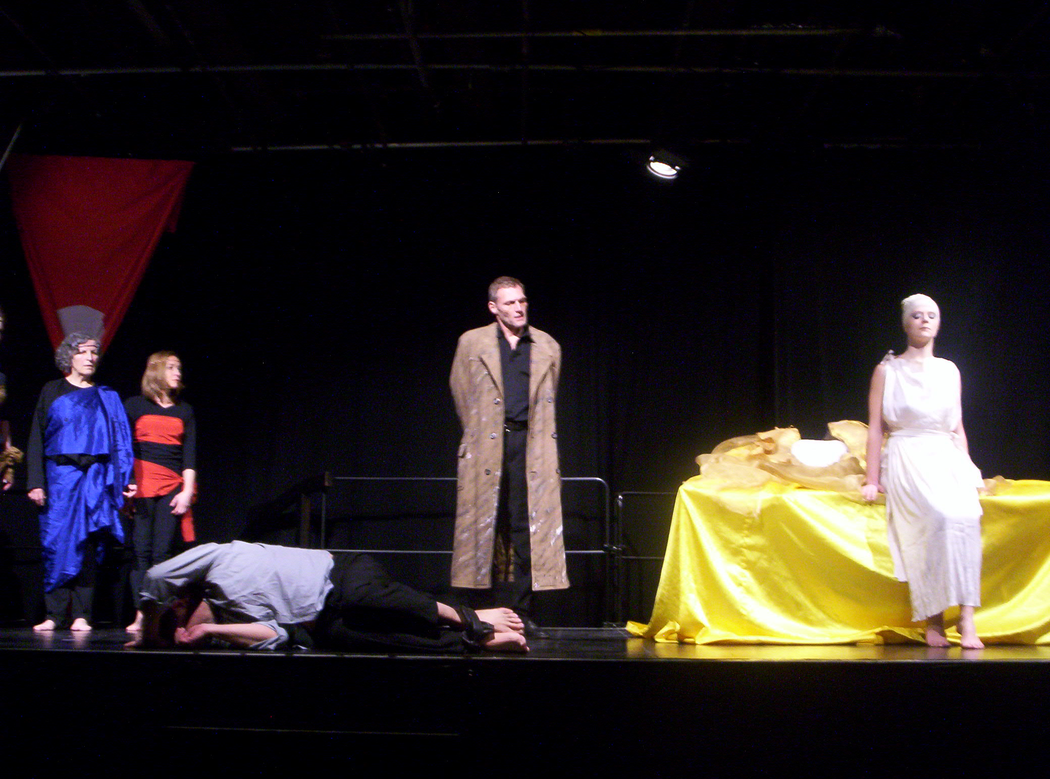 Faust II von J. W. Goethe Helena-Akt